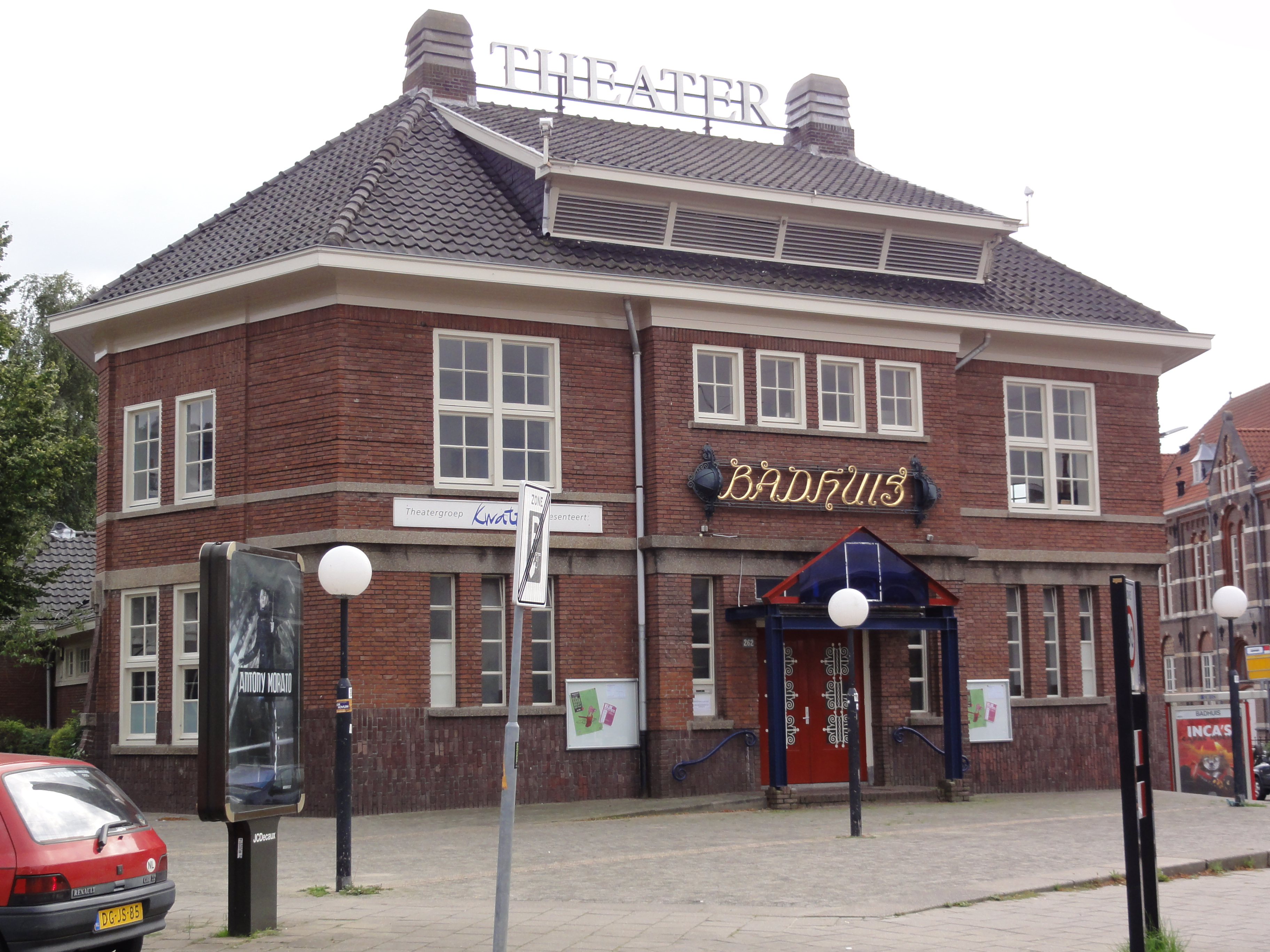 Nijmegen rijksmonument 523050 badhuis Daalseweg 262